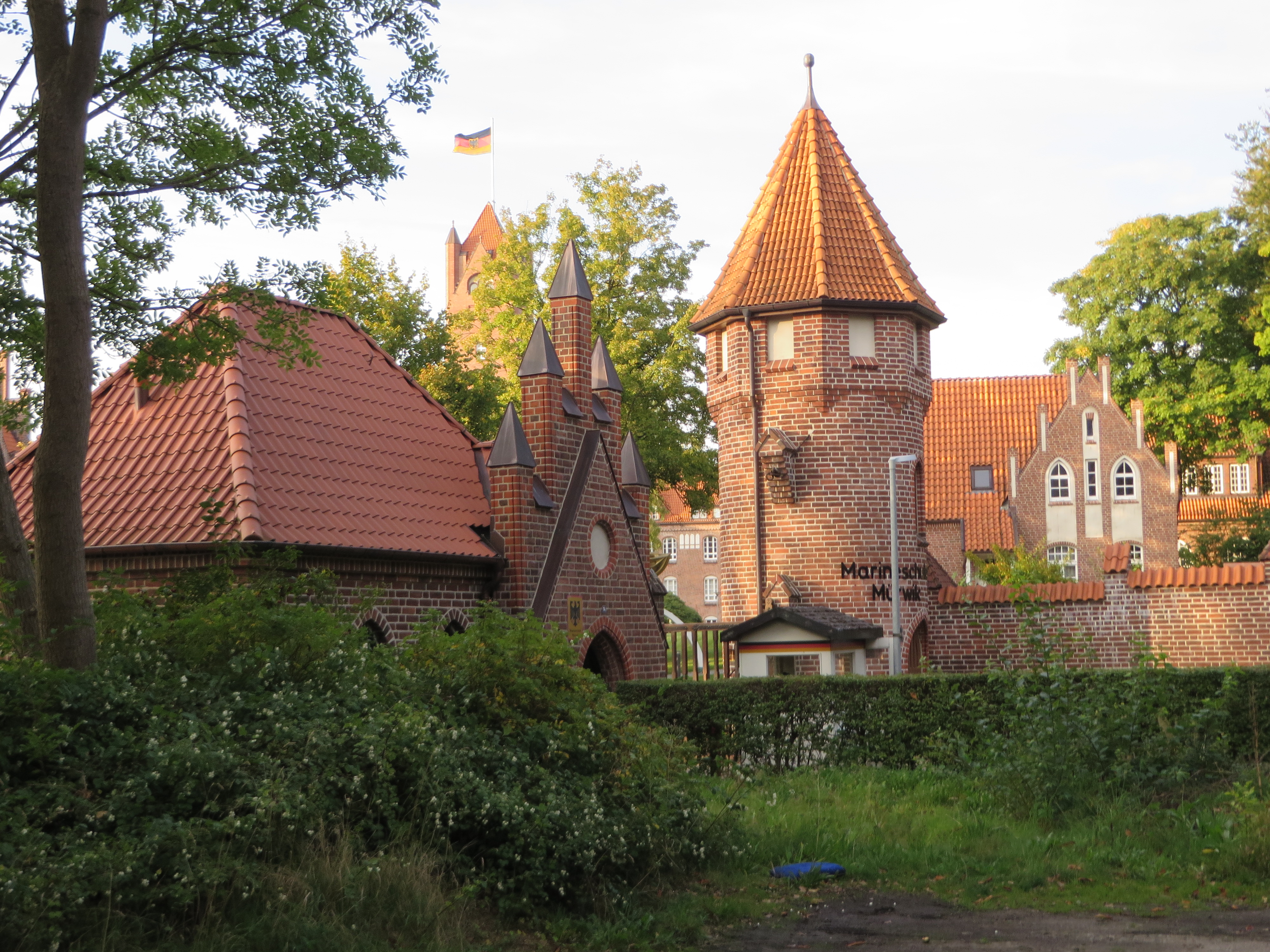 Zugang zum Burgkomplex der Marineschule Mürwik mit Begrenzungsmauer, Bild 02